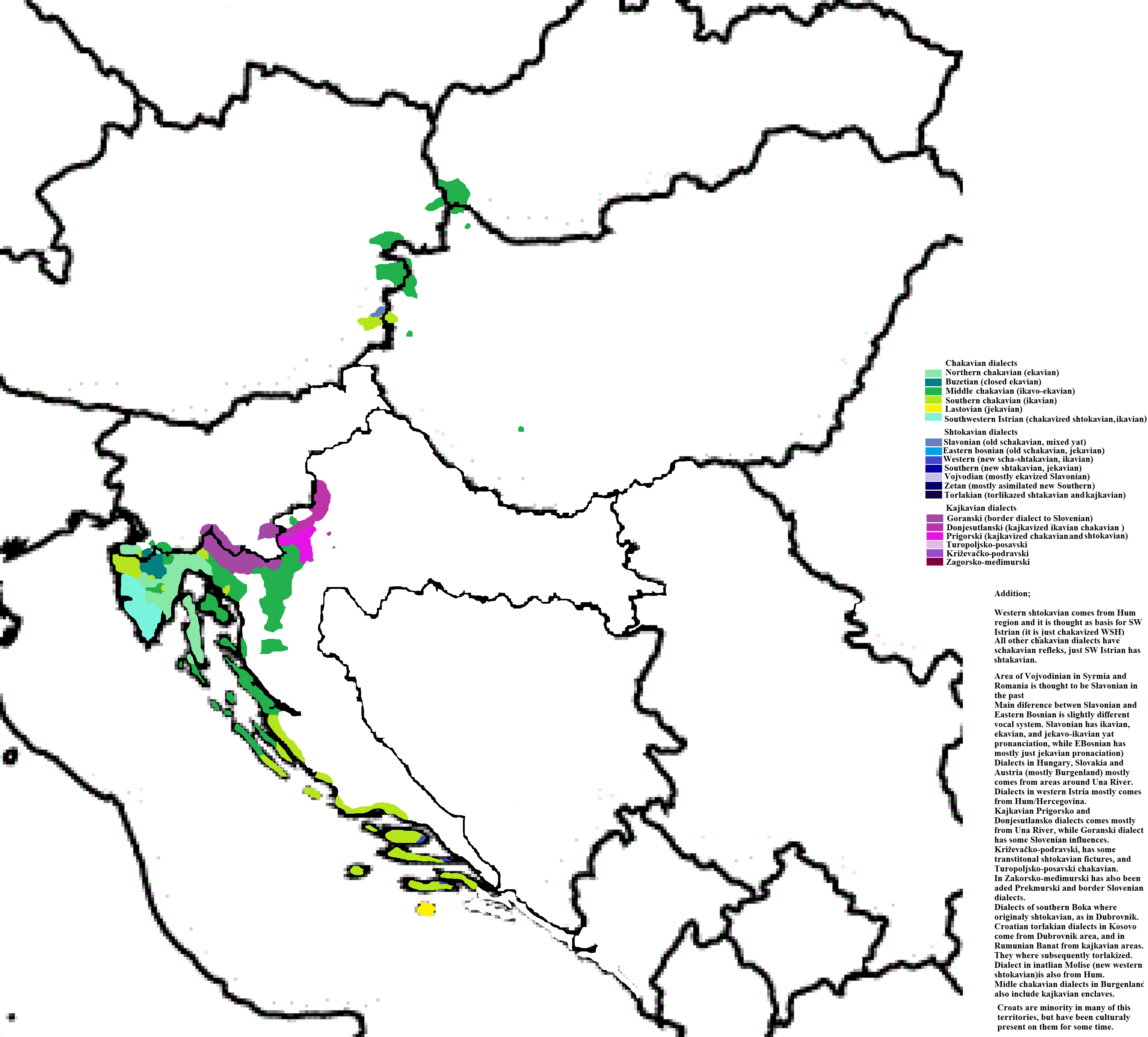 Čakavski i povezani dijalekti; donjesutlanski je kajkaviziran južnočakavski prigorski je srednječakavsko-kajkavski (turopoljsko posavski) hibrid goranski sadržava neke srednječakavske izoglose a vlahijska oaza u Gradišću je bila pod čakavskim utjecajem